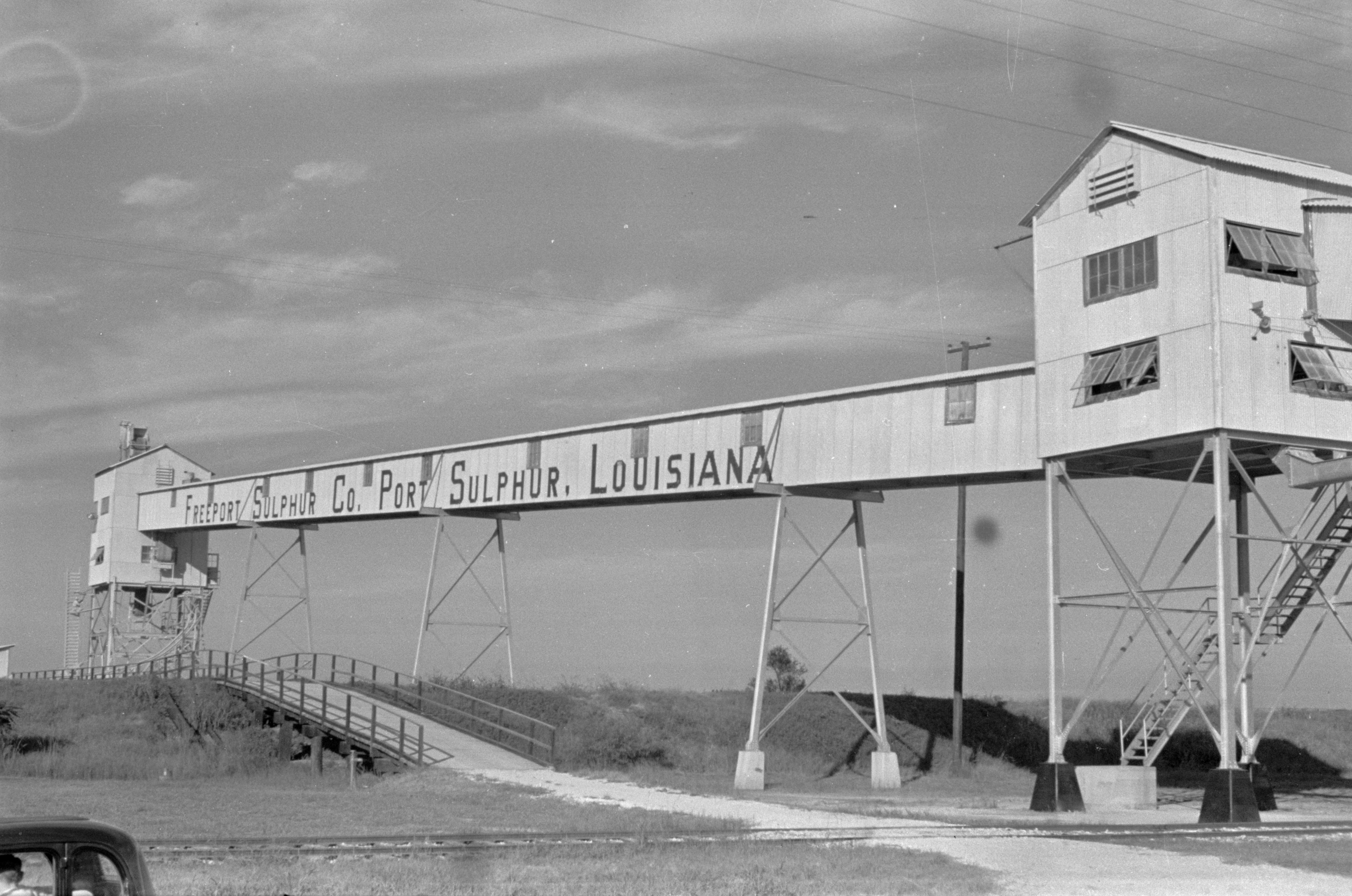 Sulphur mine, Port Sulphur, Plaquemines Parish, Louisiana.